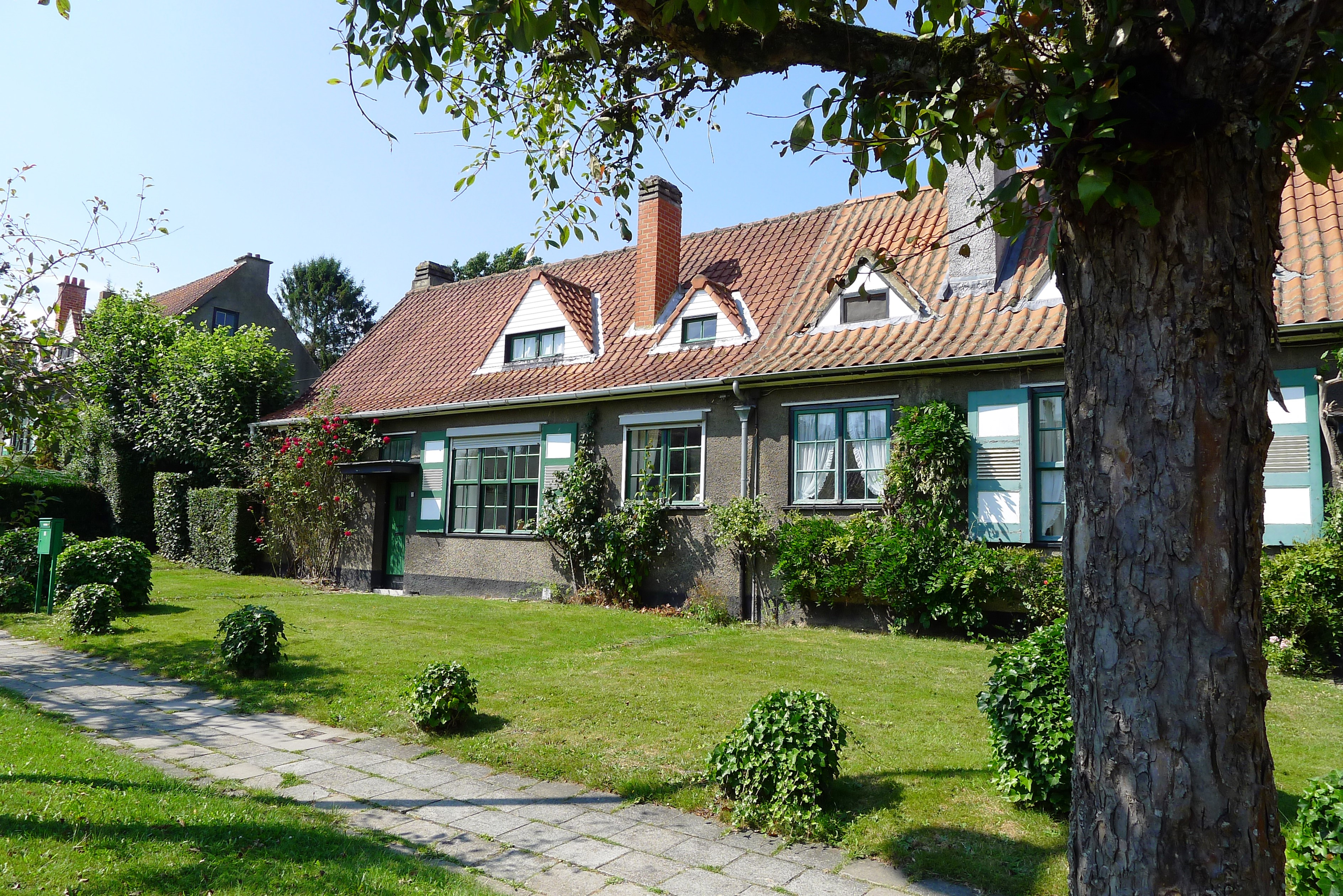 Cité-jardin Le Logis